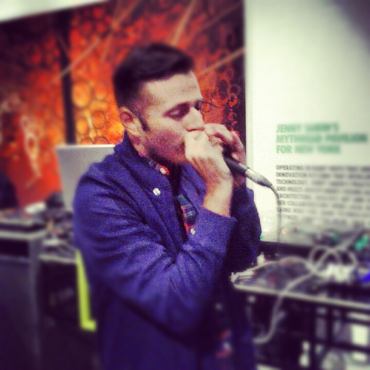 Fotografia scattata durante un'esibizione del rapper Ghemon al Nike Stadium di Milano il 6 Ottobre 2012.